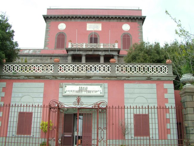 Vezuvi obszervatorium